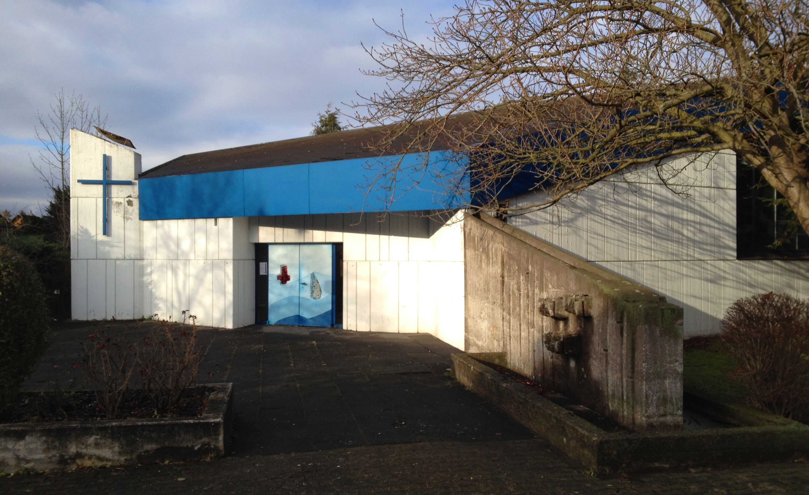 Goslar-Sudmerberg, ev.-luth. Kirche St. Peter; in der Tür Petruskreuz und Fischernetz